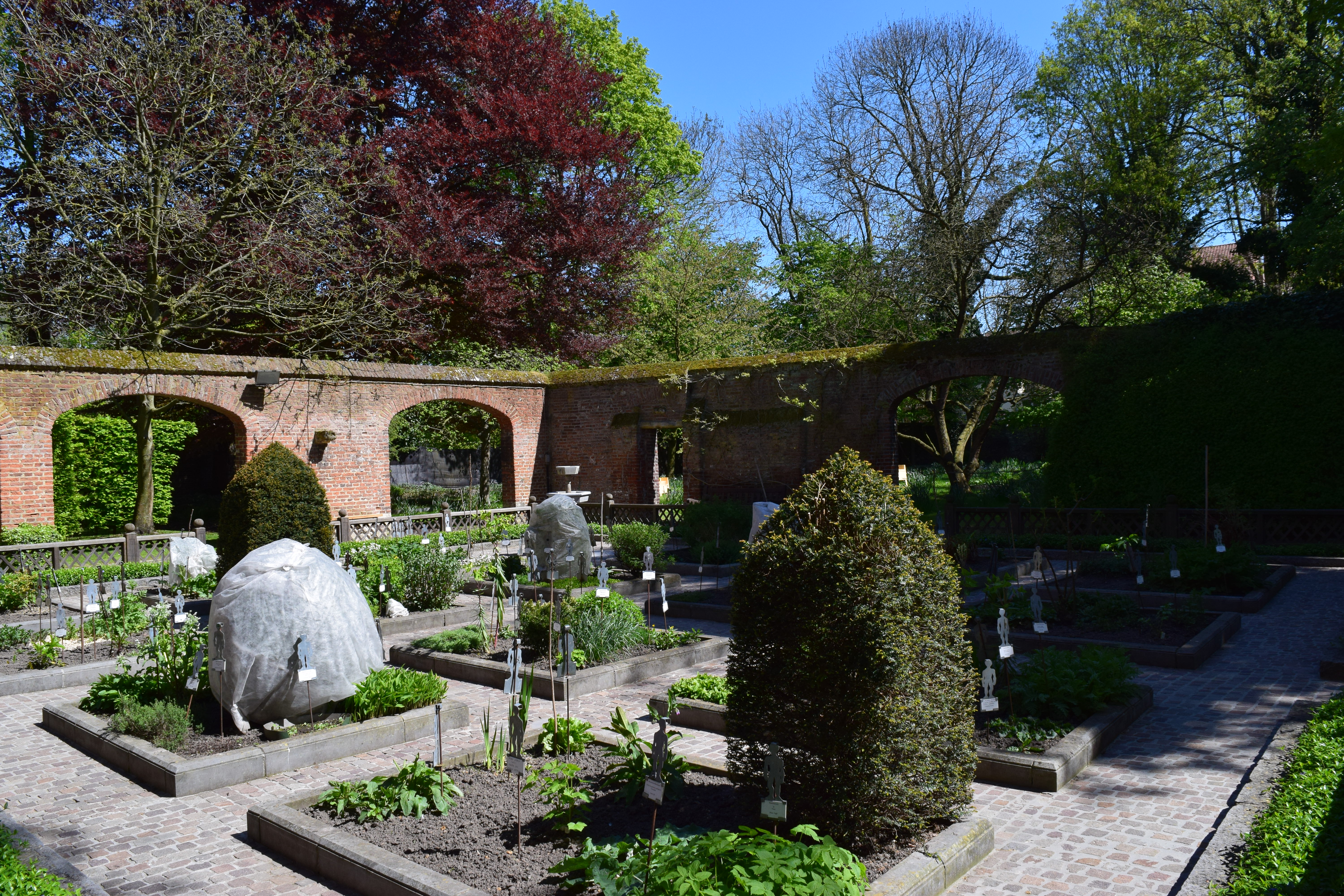 Gezondheidstuin met geometrische vormen achter het Erasmushuis in Anderlecht